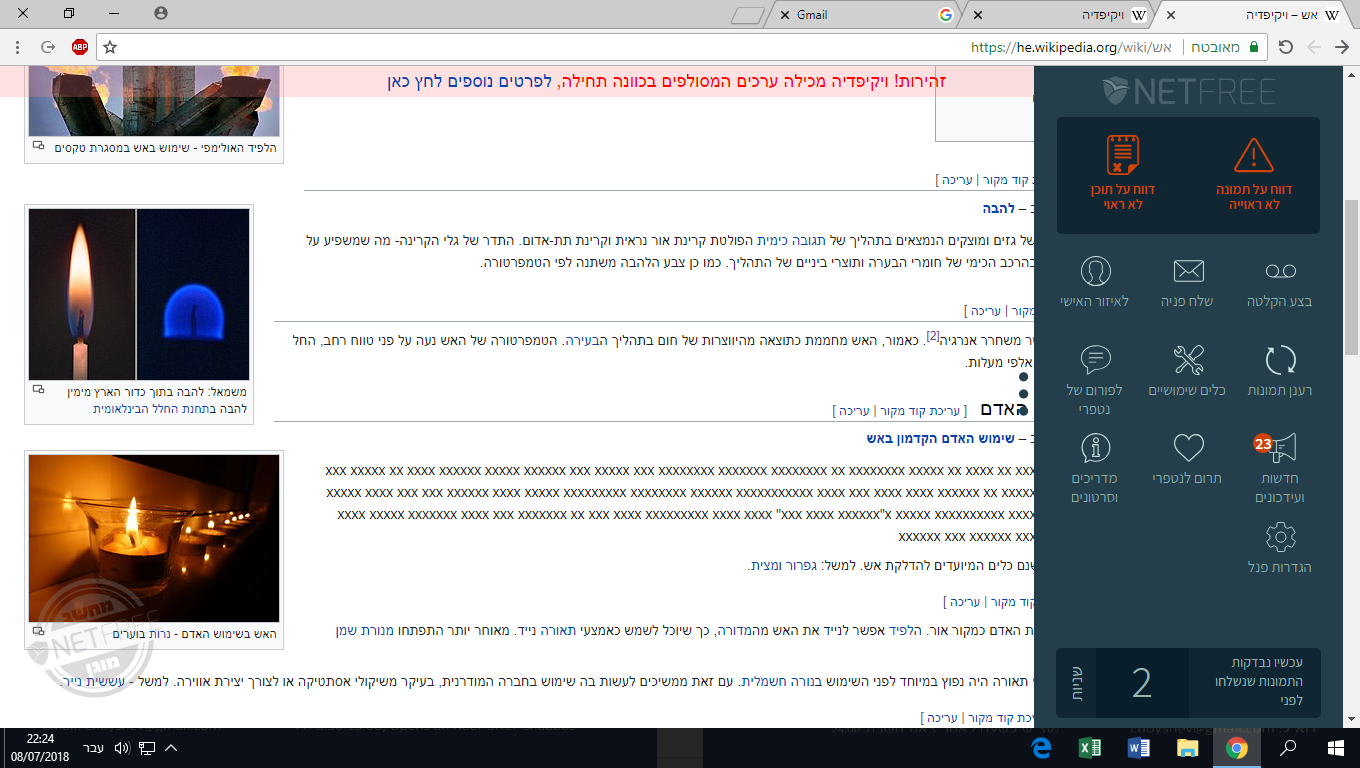 צילום מסך מתוך ויקיפדיה למשתמשי נטפרי. ריחוף עם העכבר בצד ימין של המסך פותח את סרגל האפשרויות. שימו לב לטקסט ה'מאוקסס' שסונן על ידי הרובוט.